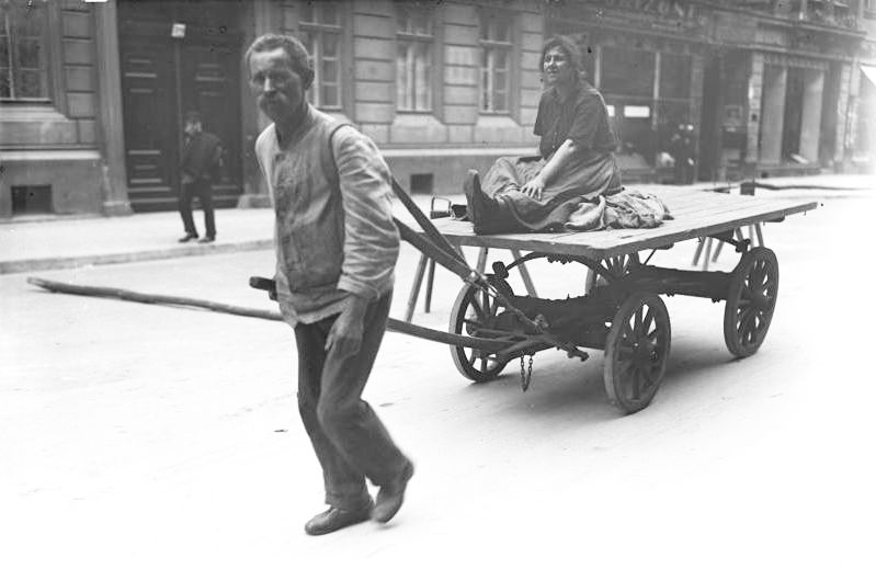 Gross-Stadtbilder, wie sie der Photograph in der 4 Millionenstadt Berlin findet! Der Lumpensammler und seine Frau begeben sich zur Arbeit.